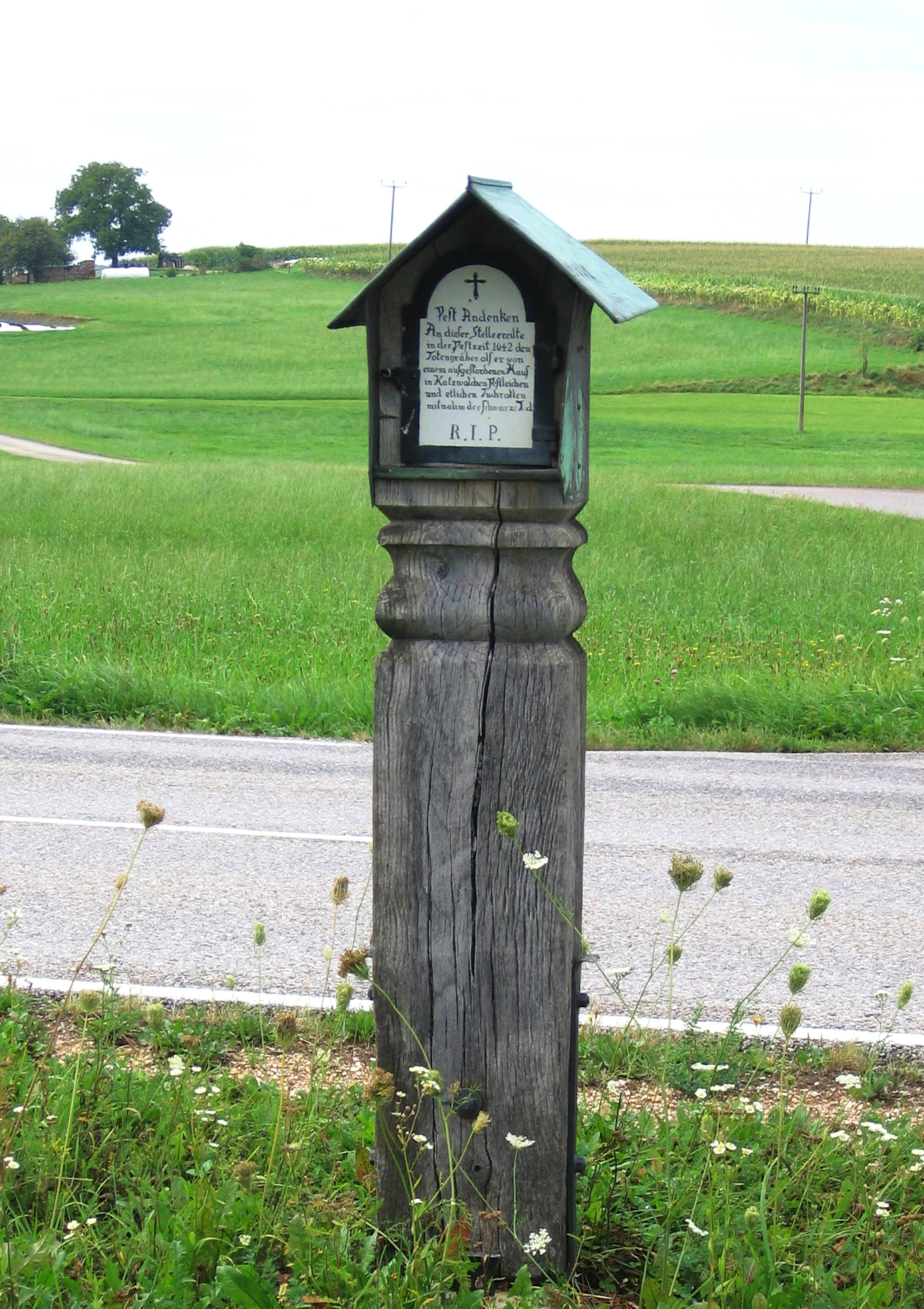 Pestmarterl, östlich von Unterschilding, Gemeinde Palling, bezeichnet mit 1642.